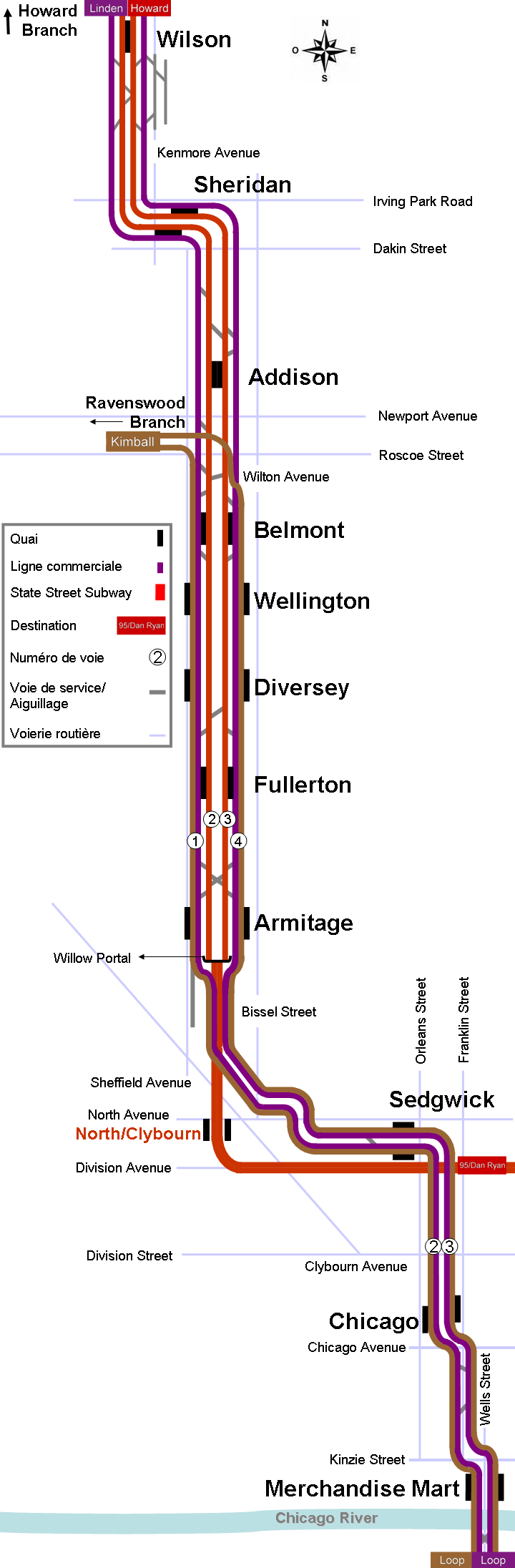 Plan des voies de la NSML